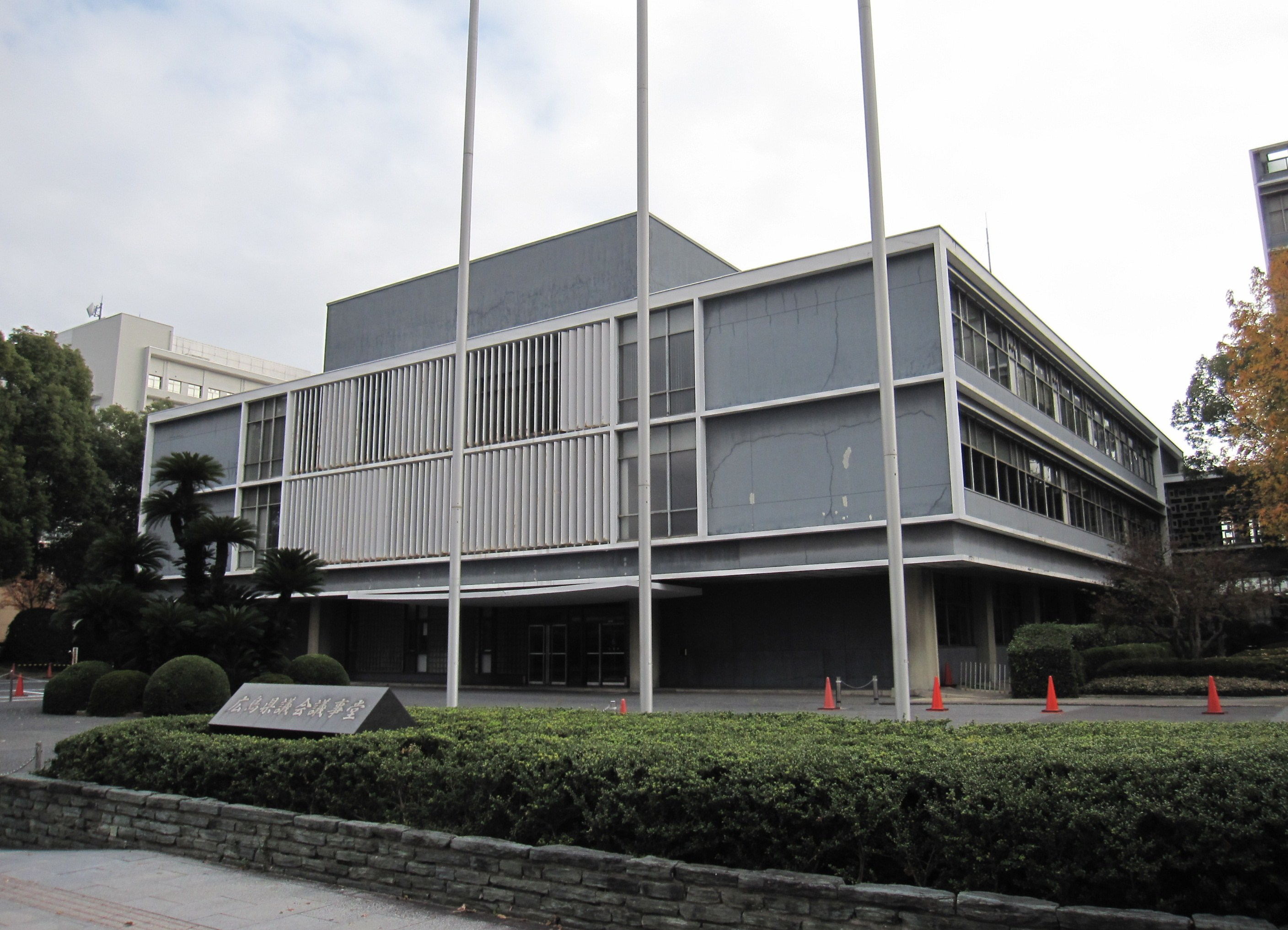 広島県議会議事堂